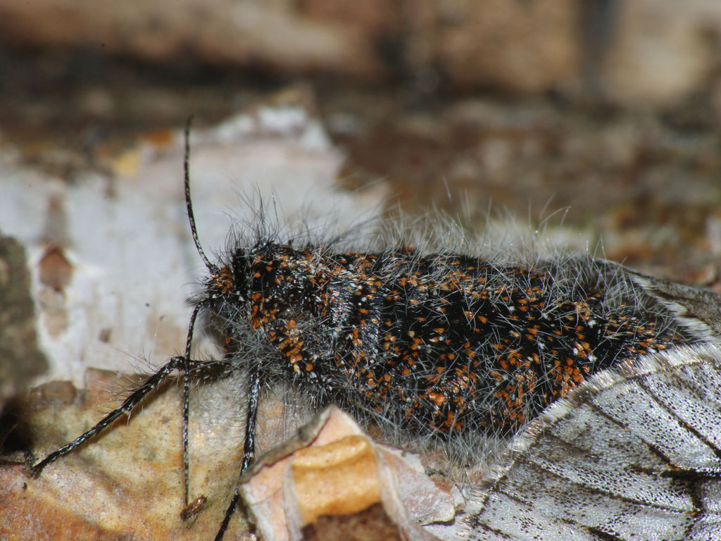 Exemplar found: Russia, Moscow Oblast, Odintsovsky District, near station Razdory, 06.04.2010, on silver birch (Betula pendula) bark, days МО, Одинцовский р-н, окрестности станции Раздоры, 06.04.2010, на стволе берёзы, днём